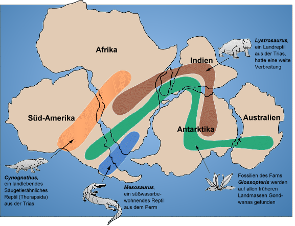 Belege für die Existenz des Südkontinents Gondwana und der Plattentektonik in der Erdgeschichte anhand von Fossilien.